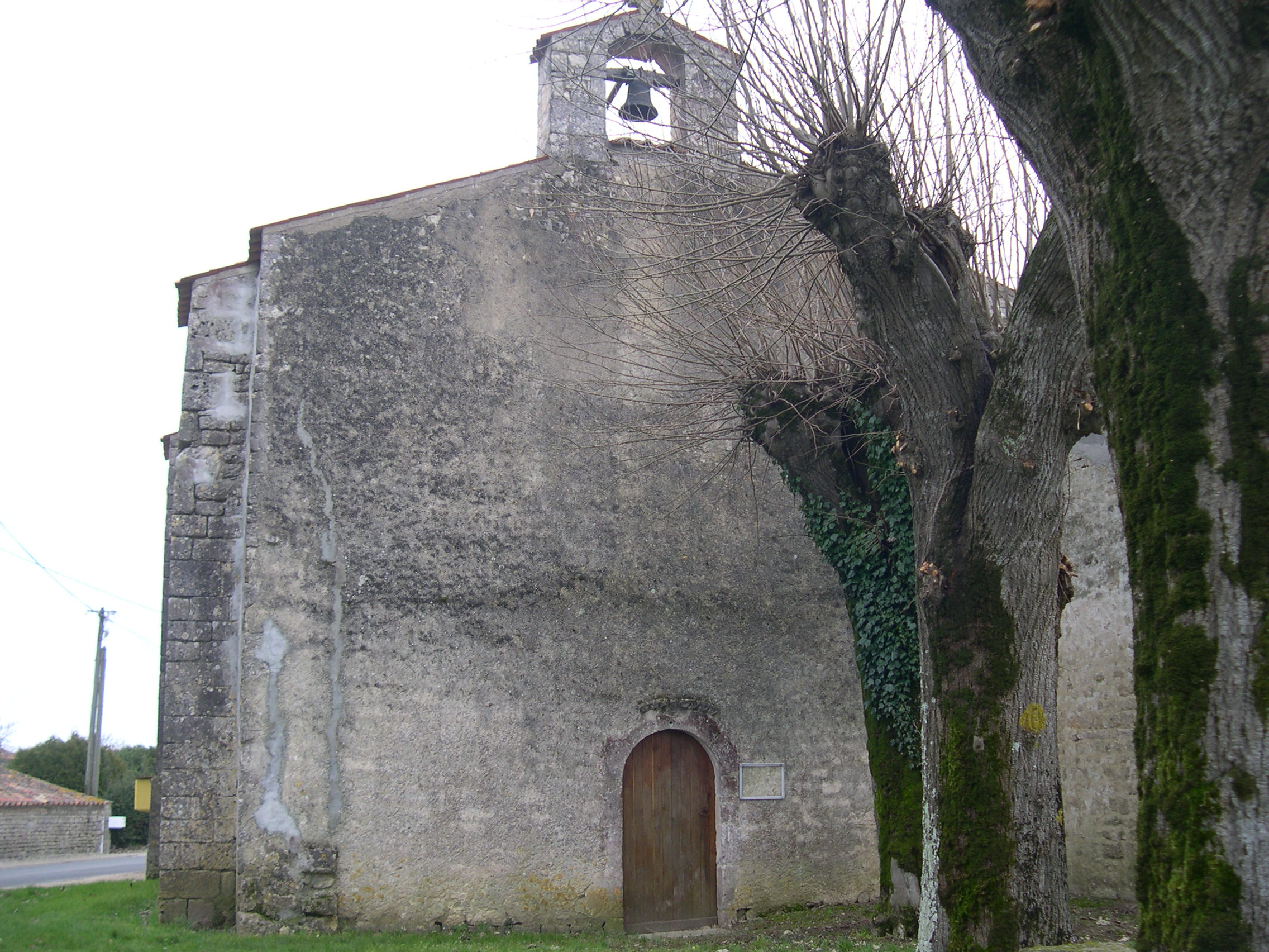 Façade de l'église de Villenouvelle. En Charente Maritime